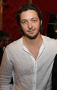 Silvio Muccino & Max Mazzotta